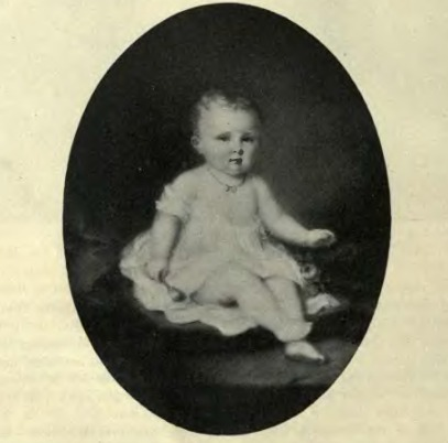 Francisco Fernando de Austria, heredero al trono austrohúngaro, asesinado en Sarajevo en 1914.